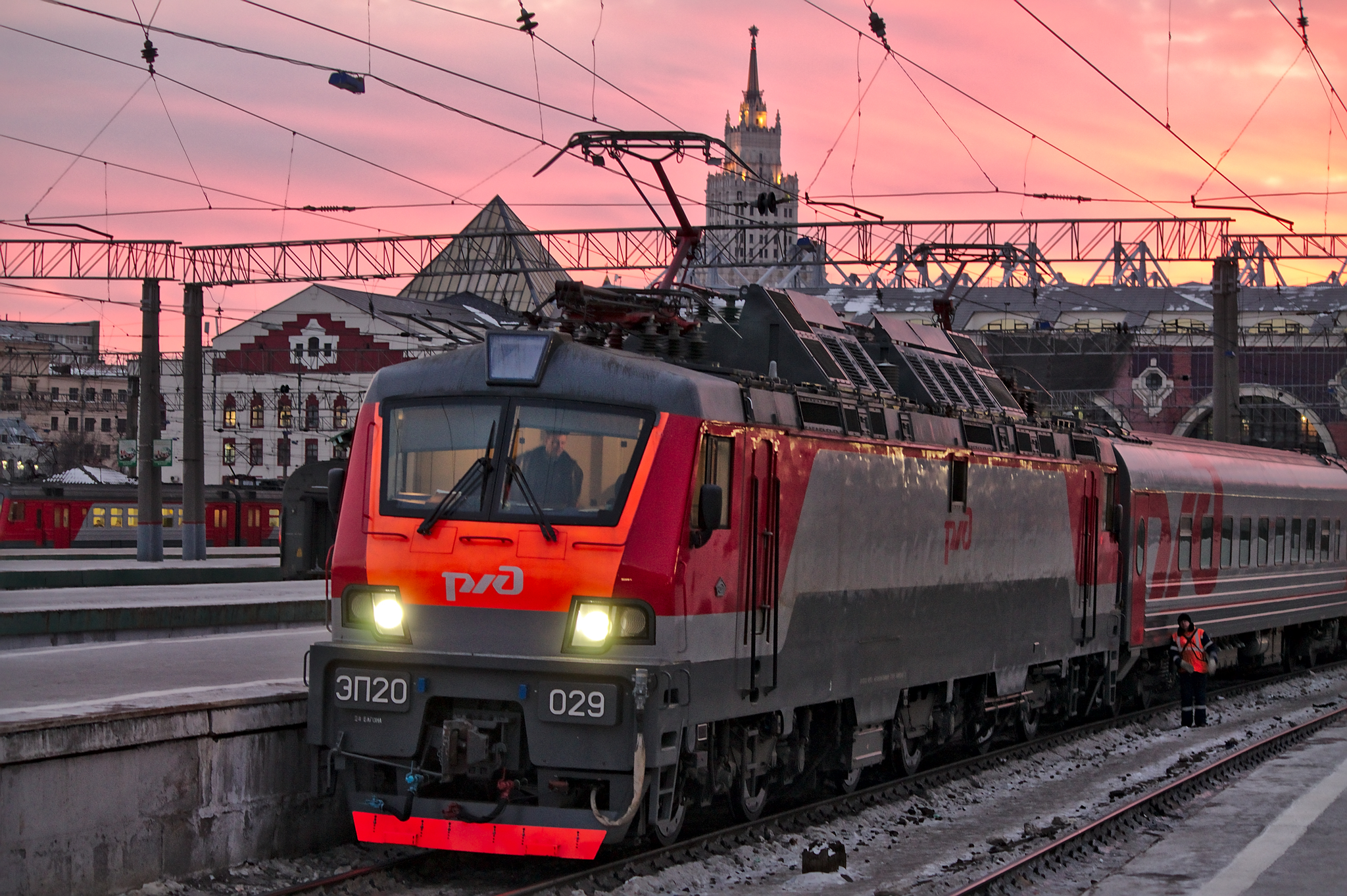 ЭП20-029, Казанский вокзал, Москва. см. фото 580278 в альбоме автора